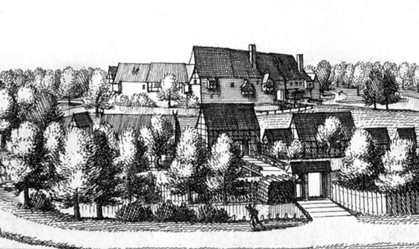 Burg Knesebeck als Merian Kupferstich